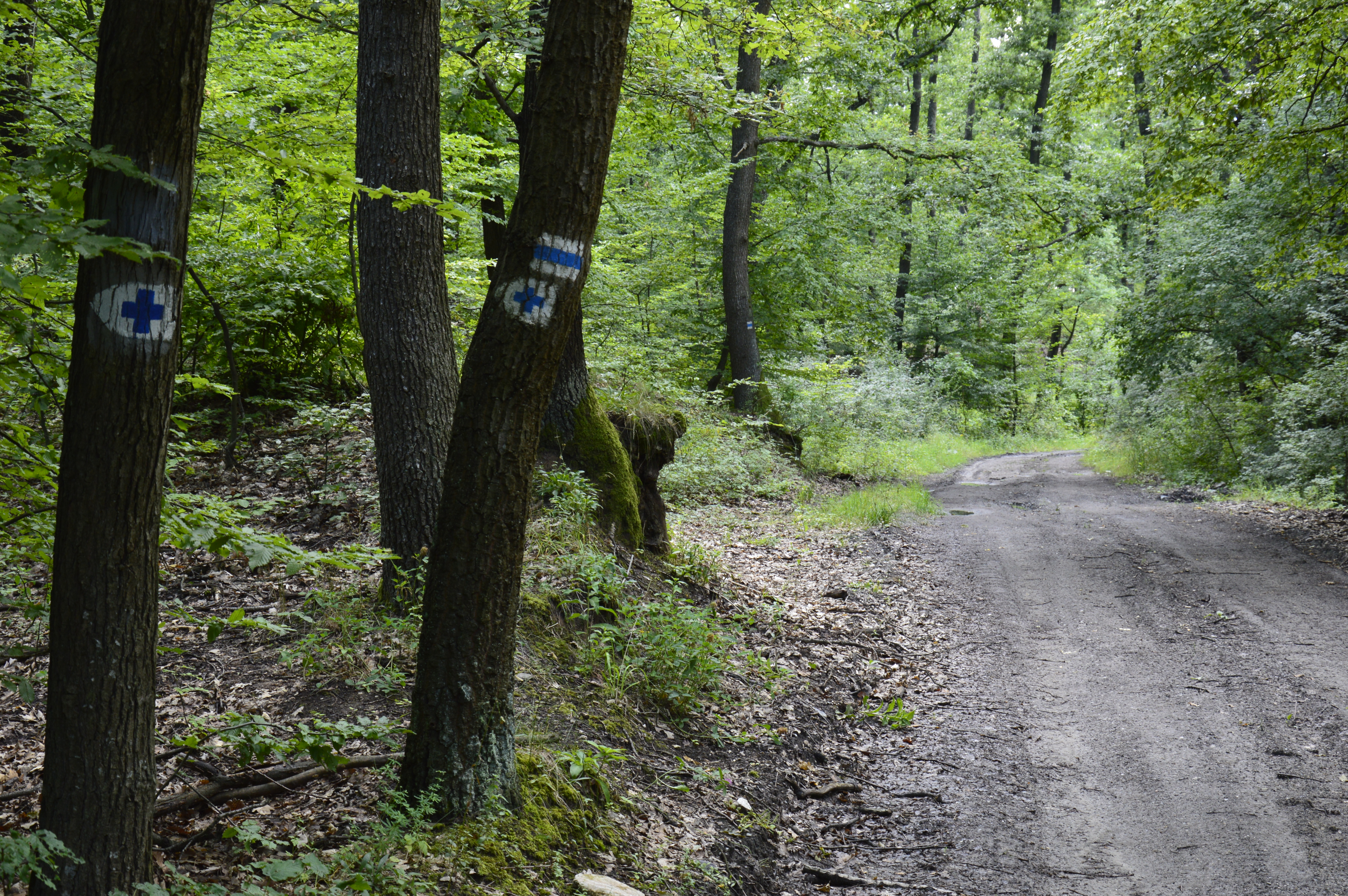 Medve